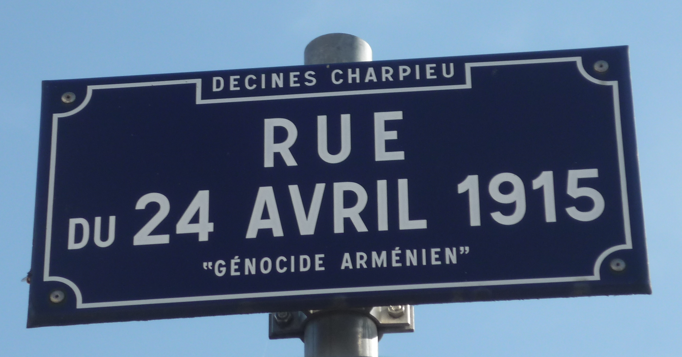 Plaque de la rue du 24-avril-1915 à Décines-Charpieu, dans le département du Rhône